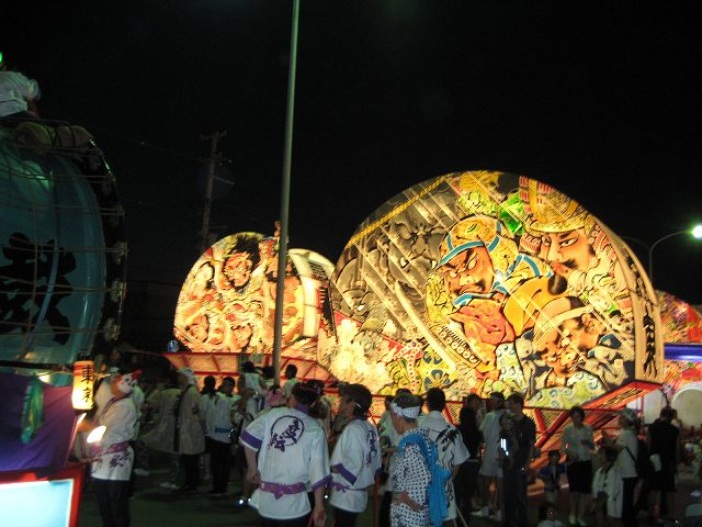 弘前ねぷたまつり（2008年）